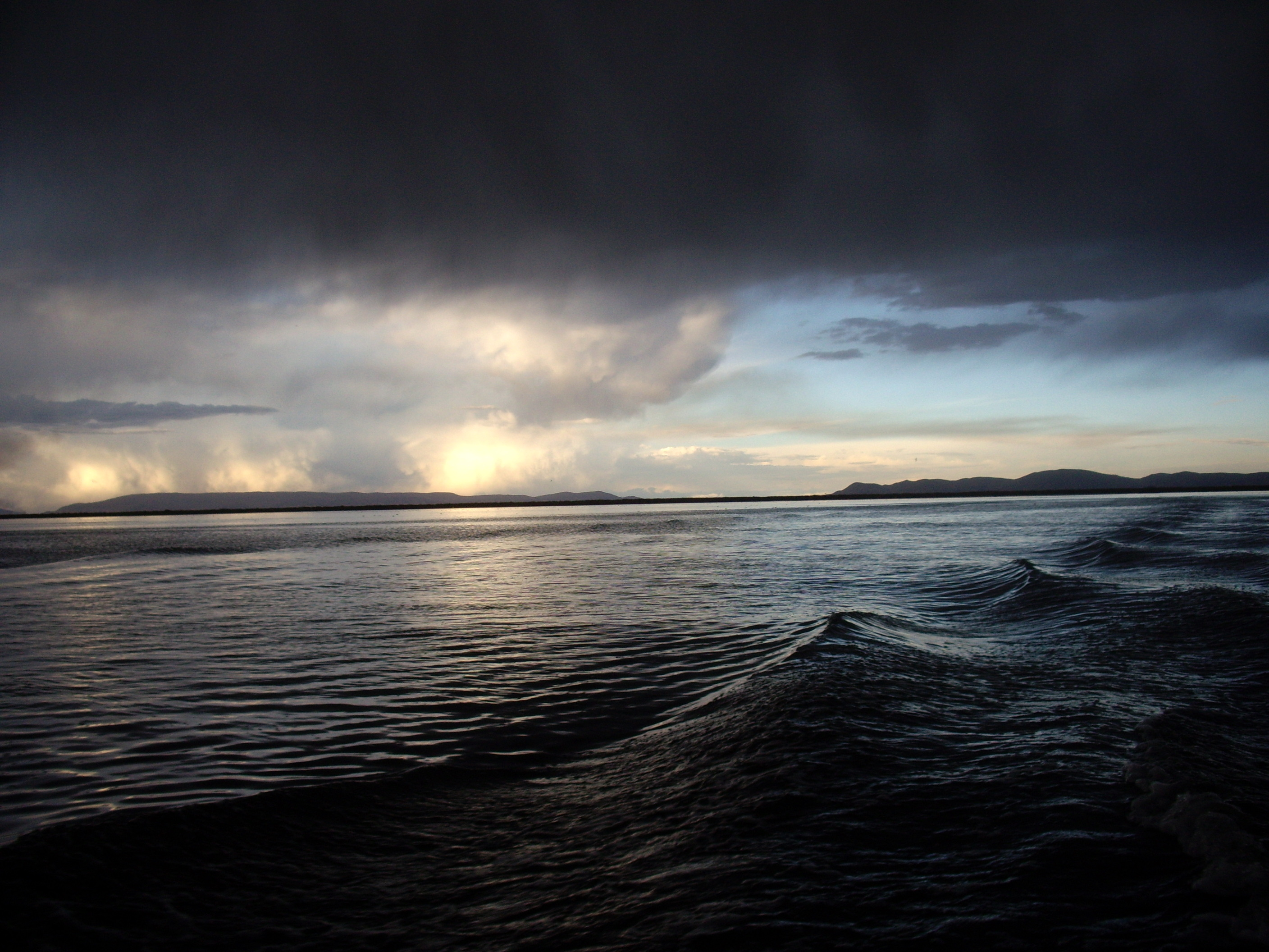 A punt de la tormenta al llac Titicaca